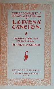 Portada de la traducción de Díez-Canedo: La buena canción de Verlaine, 1924.